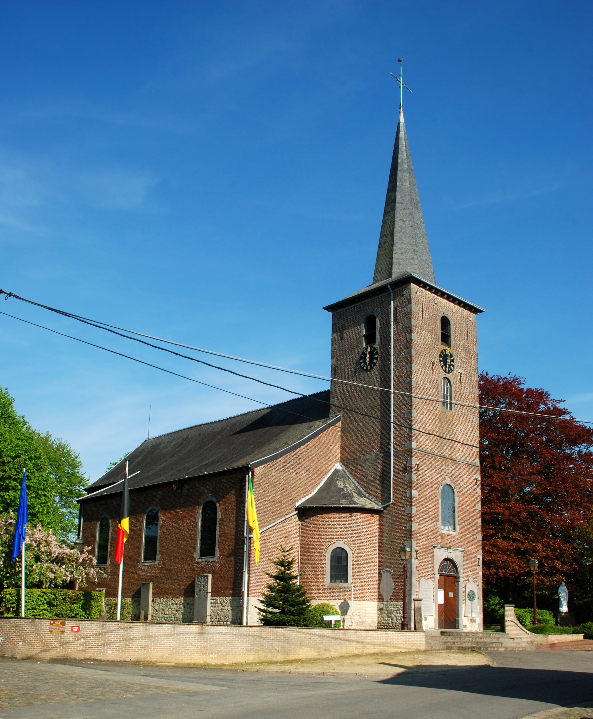 Belgique - Brabant wallon - Mont-Saint-Guibert - Église Saint-Pierre de Corbais (classique, 1773)